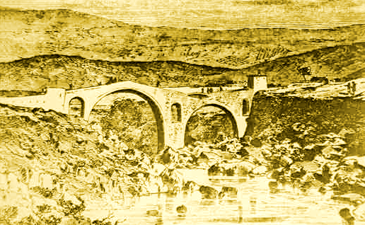 Srpski (latinica): Stari Vezirov most na Morači, kod tadašnje Podgorice, podignut od strane Mahmut-paše (skadarski sandžak-beg) krajem XVIII vijeka.